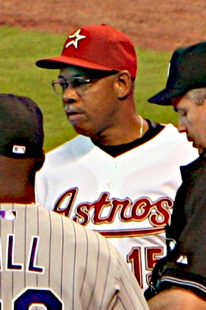 Cecil Cooper